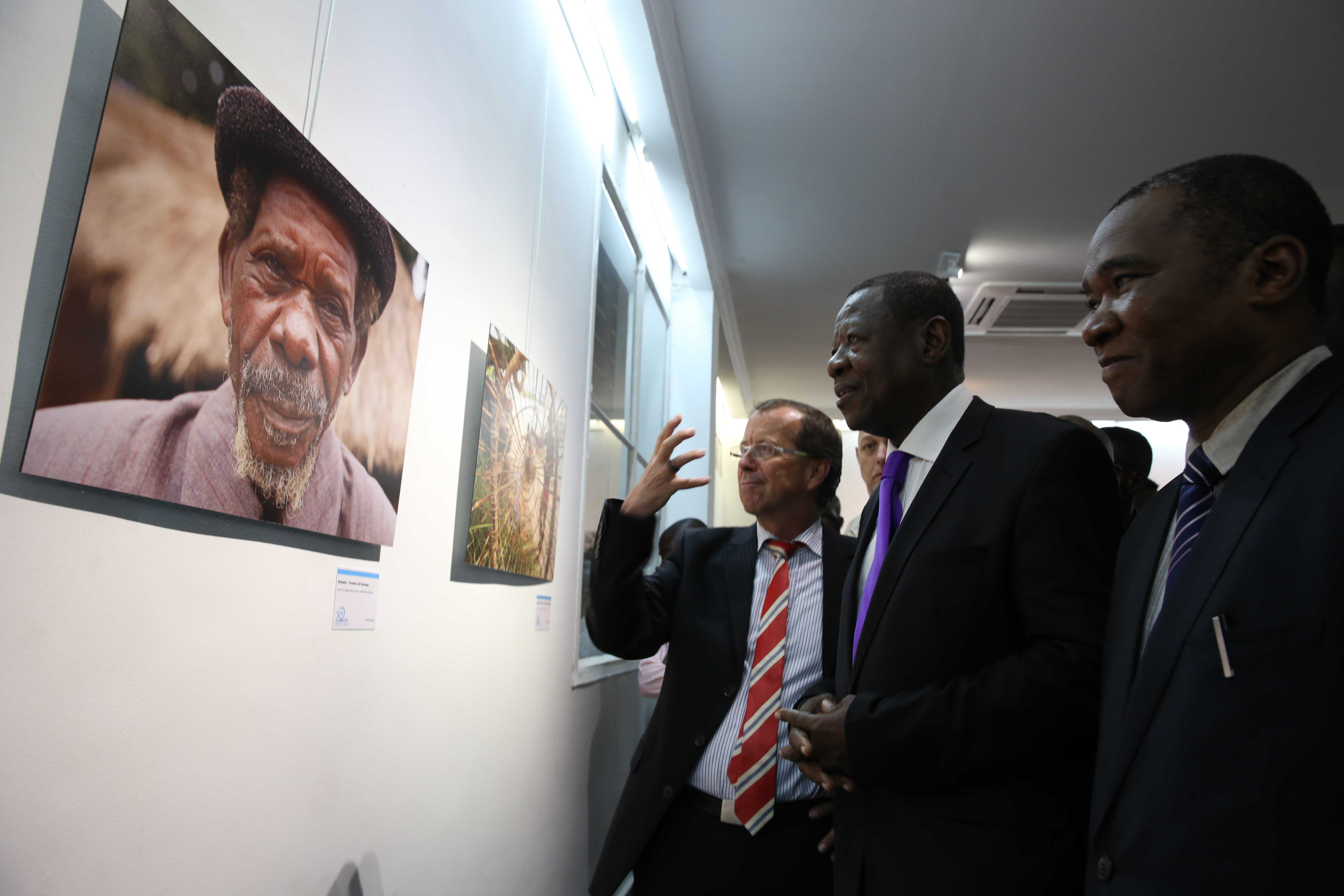 22 mai 2015, Institut français de Kinshasa Halle de la Gombe, RD Congo: Vernissage de l’exposition photo de la MONUSCO organisée du 22 mai au 6 juin dans le cadre du 70e anniversaire de l’ONU. Sur la photo, on voit le Chef de la MONUSCO, Martin Kobler (1er à gauche), le Ministre congolais de la Communication et des Médias, Lambert Mende (au milieu), et le Directeur de la Division de l’Information publique de la MONUSCO, Charles Antoine Bambara, commentant une photo montrant une personne déplacée interne. Photo MONUSCO/Abel Kavanagh 22 May 2015, French Institute of Kinshasa, Halle de la Gombe: Official opening of MONUSCO’s photo exhibition organized from 22 May to 6 June in the framework of the 70th anniversary of the United Nations. In the photo are the Head of MONUSCO, Martin Kobler (1st left), the Congolese Minister of Communication and Media, Lambert Mende (middle), and the Director of MONUSCO Public Information Division, Charles Antoine Bambara, commenting on a picture showing an internally displaced person. Photo MONUSCO/Abel Kavanagh